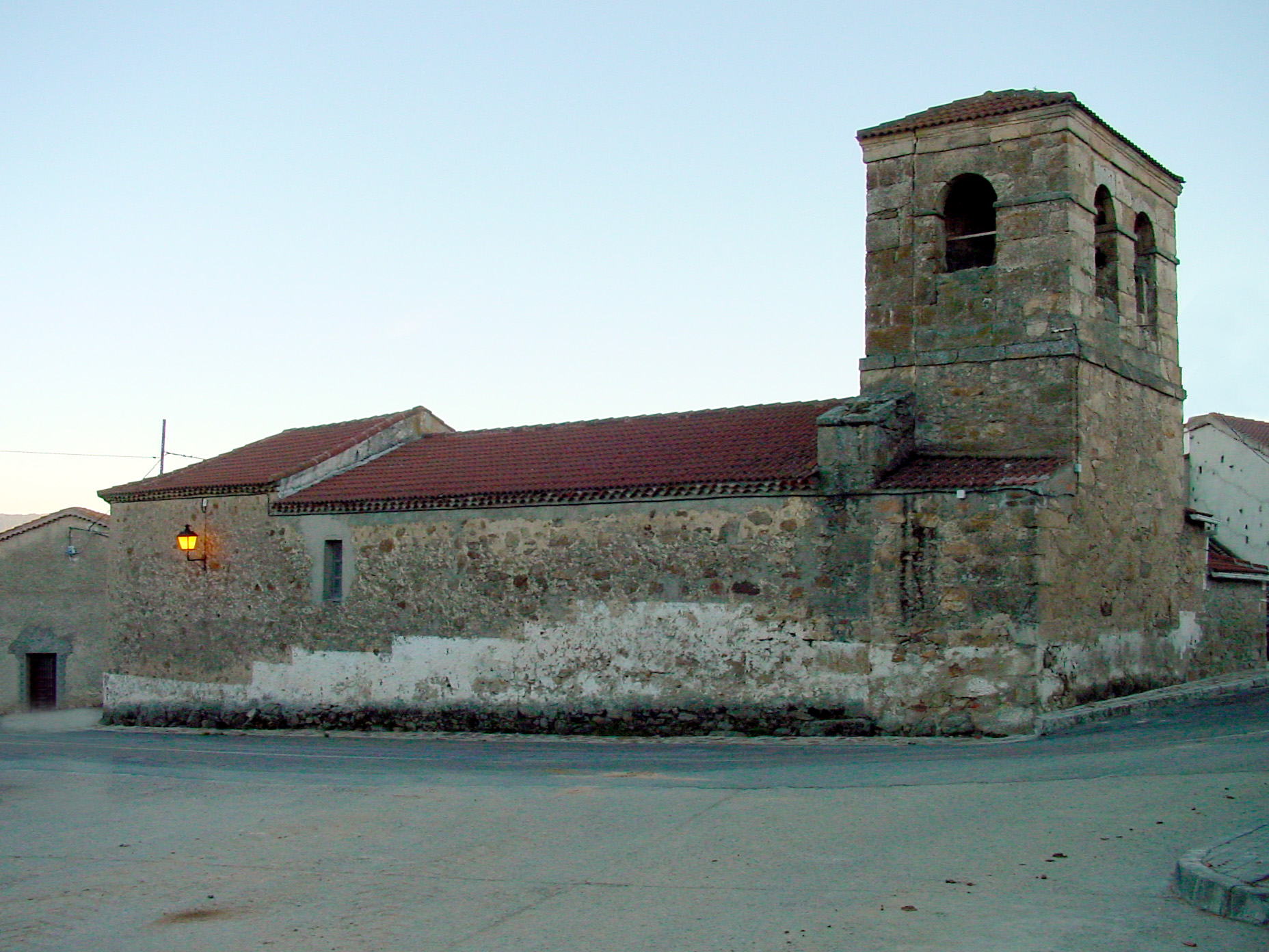 Vista de iglesia en Piñuécar Gandullas